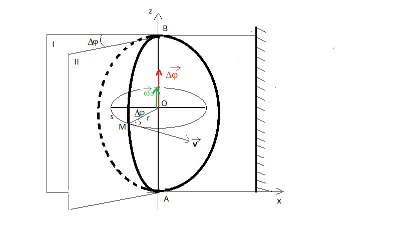 Rotaciono kretanje čvrstih tela